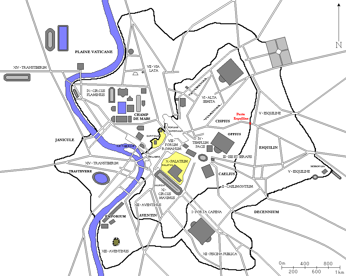 Plan de Rome avec la Porte Esquiline (= Arc de Gallienus) en rouge